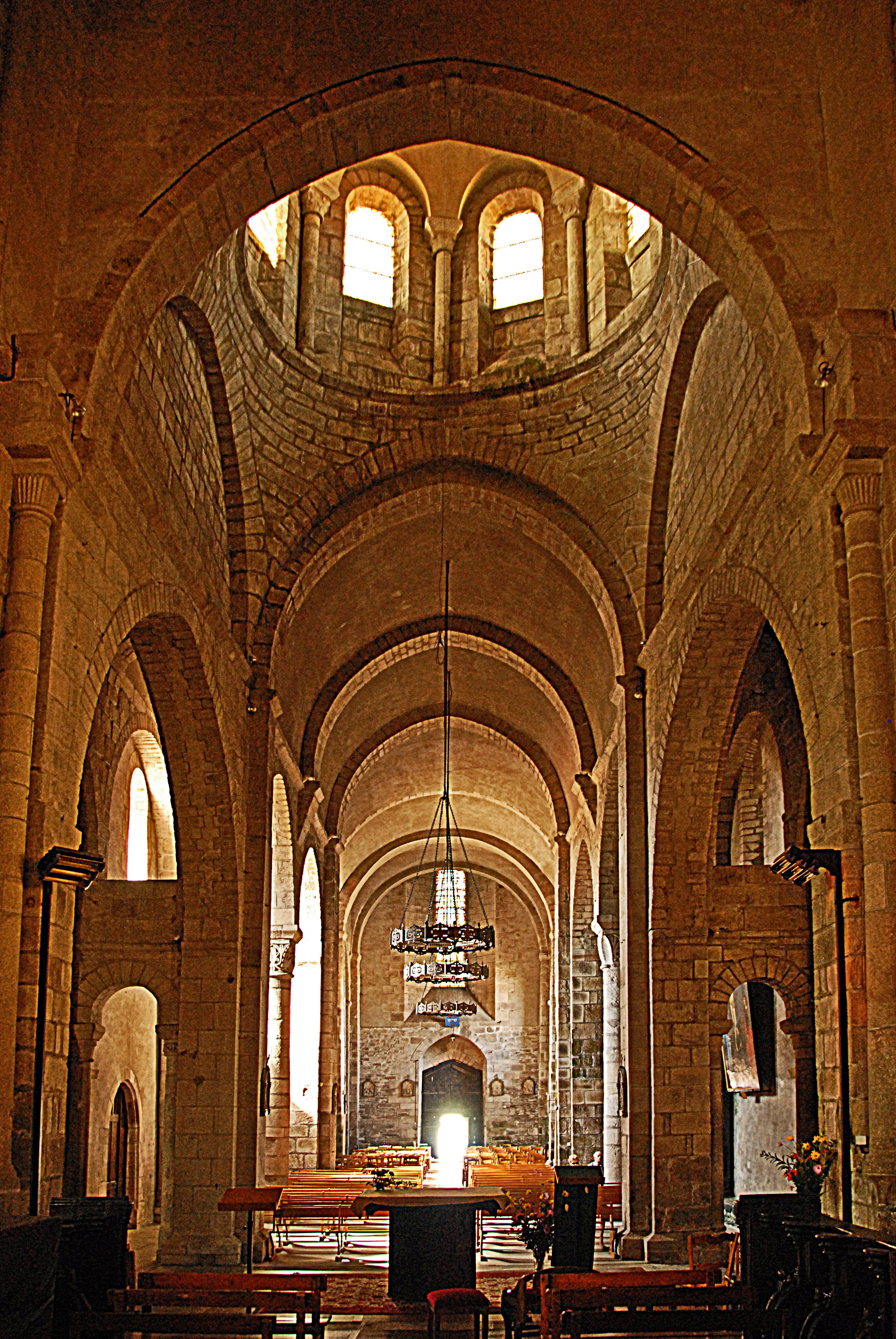 Stiftskirche St.-Léonard-de-Noblat, Vierung u. Langhaus aus Chor